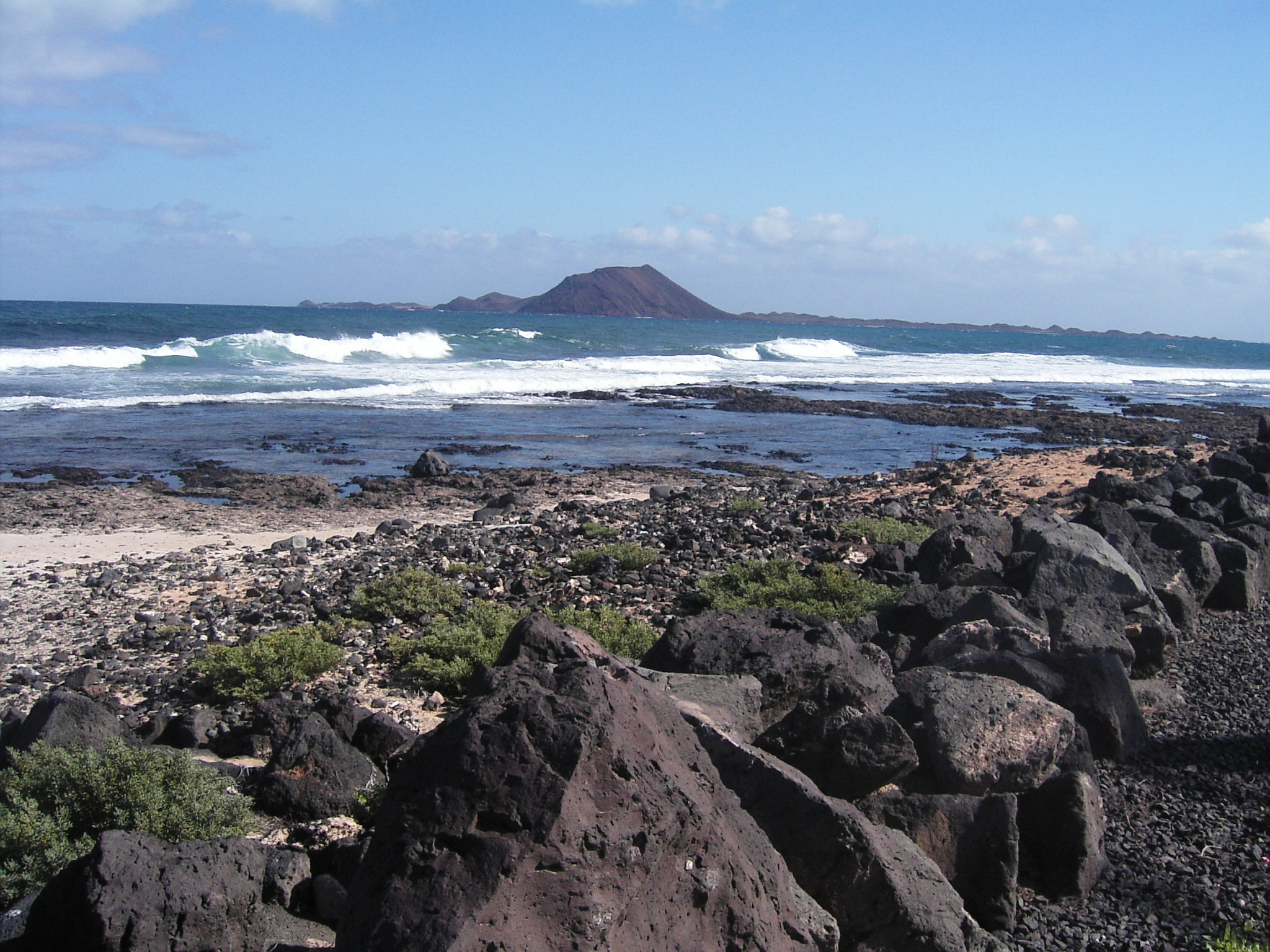 Isla de los Lobos, von Fuerteventura aus gesehen